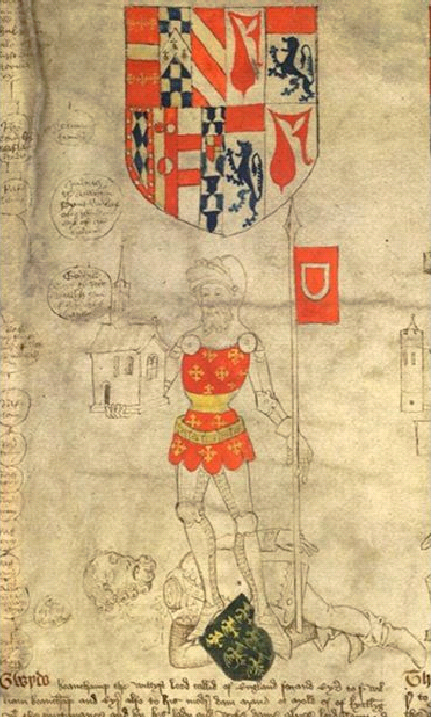 Ги де Бошан, 10-й граф Уорик, попирающий труп Гавестона. Рисунок 1483–84 гг. Свиток Роуза. Джон Роуз